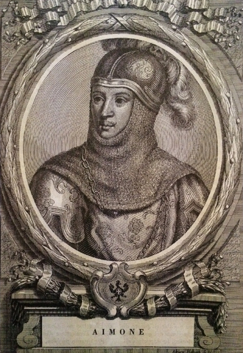 Aimone di Savoia (1291 - 1343)